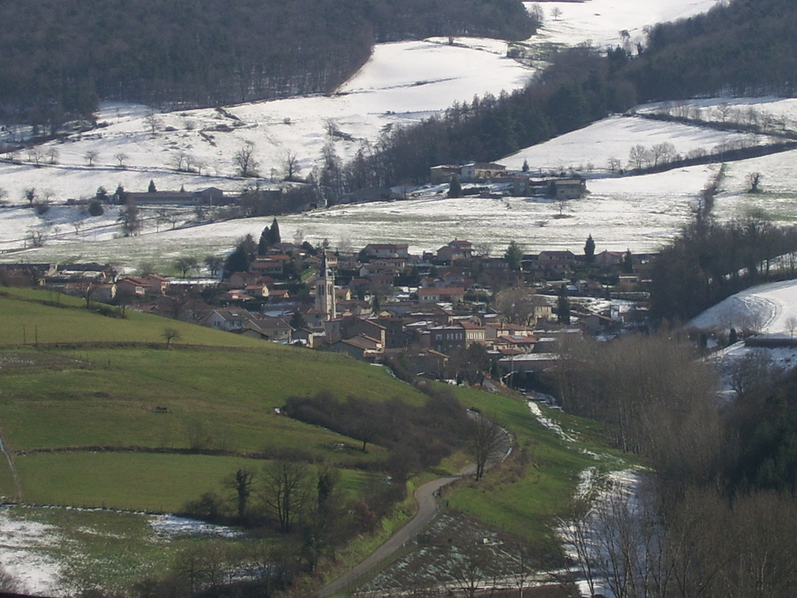 Vue globale du village de Saint-Genis-l'Argentière.